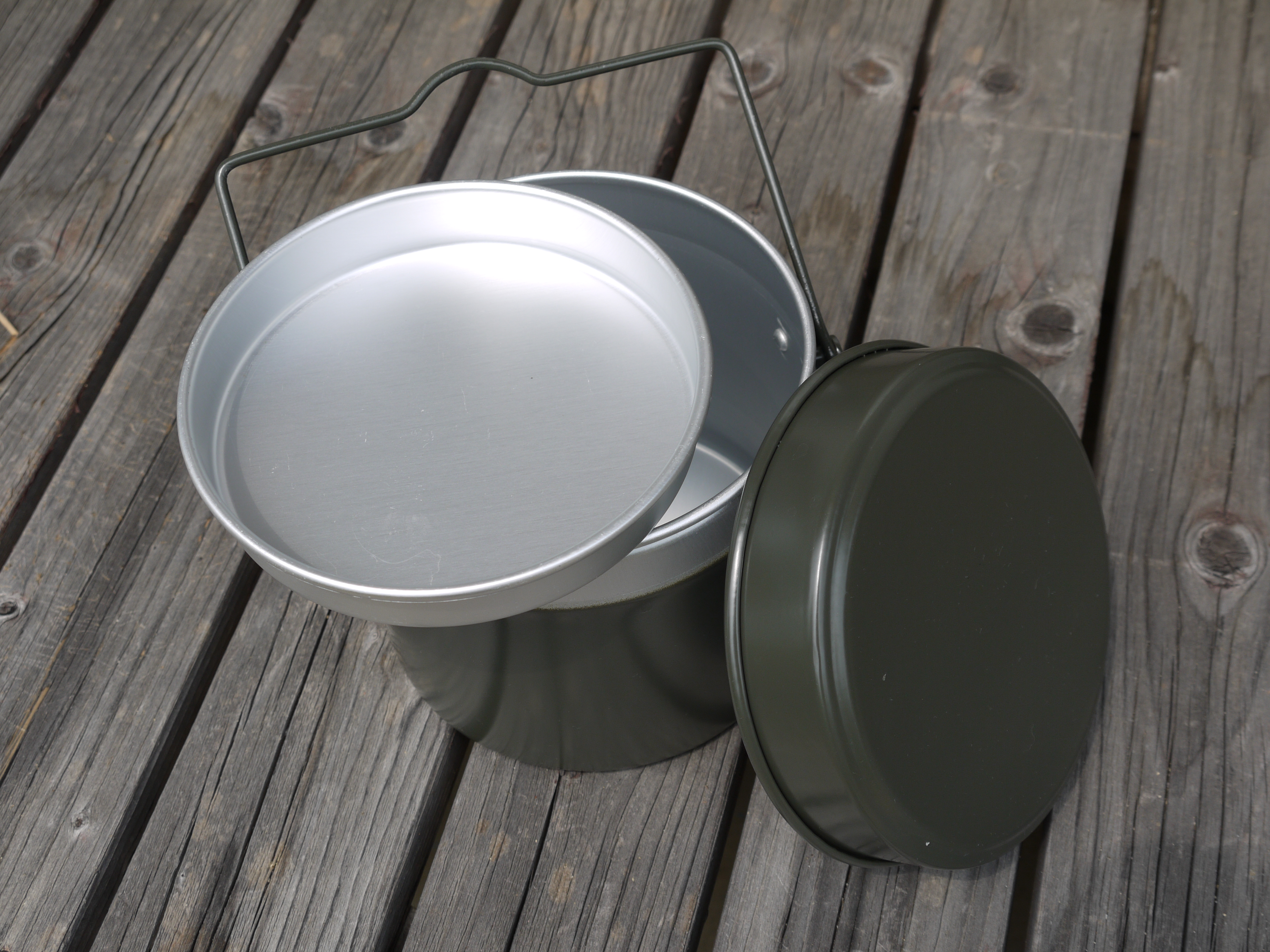 Japanese military mess kit